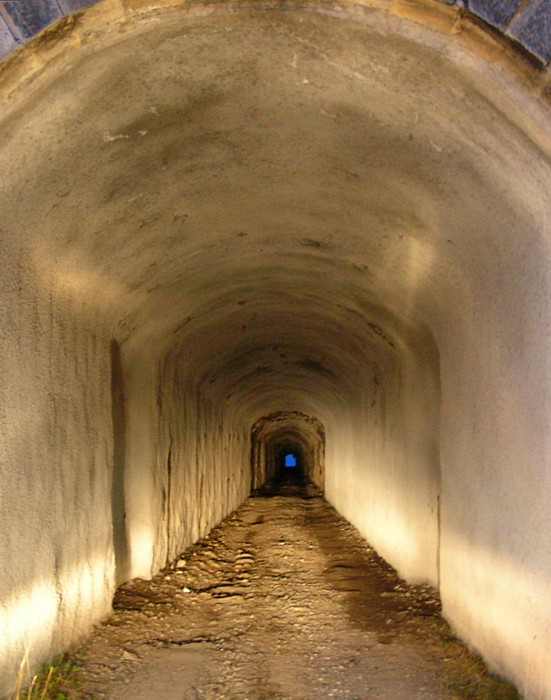 Tunnel net voor de Alpe Gesero op 1800 meter